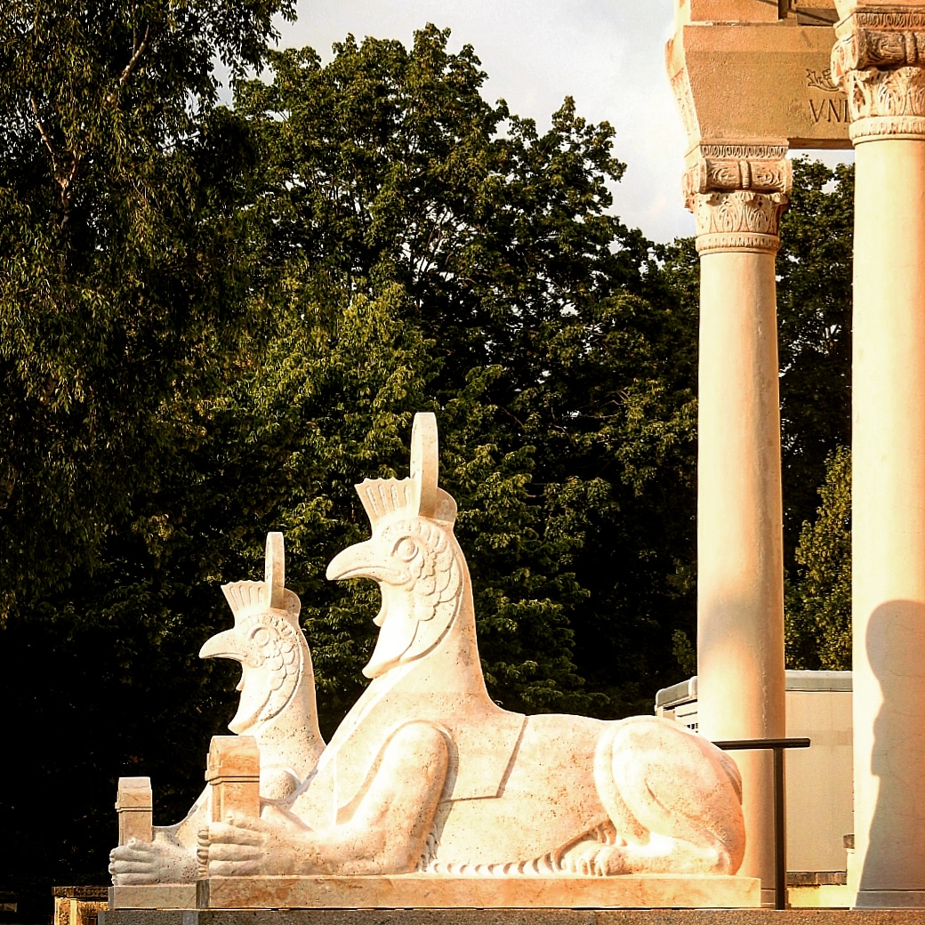 Sphingenpaar gegen Norden vor der Aussegnungshalle Nordfriedhof München